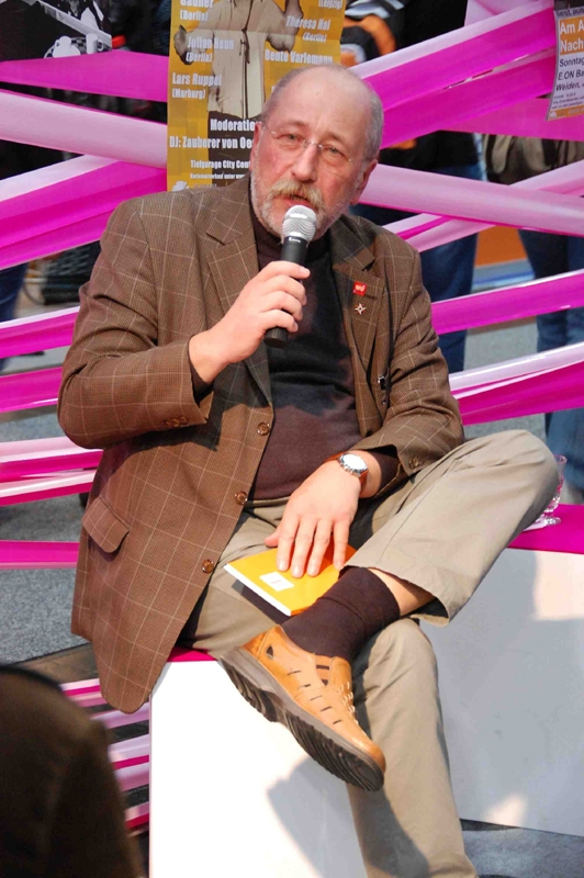 Bernhard M. Baron als Talk-Gast am Stand der Literaturstiftung Bayern auf der Leipziger Buchmesse 2010